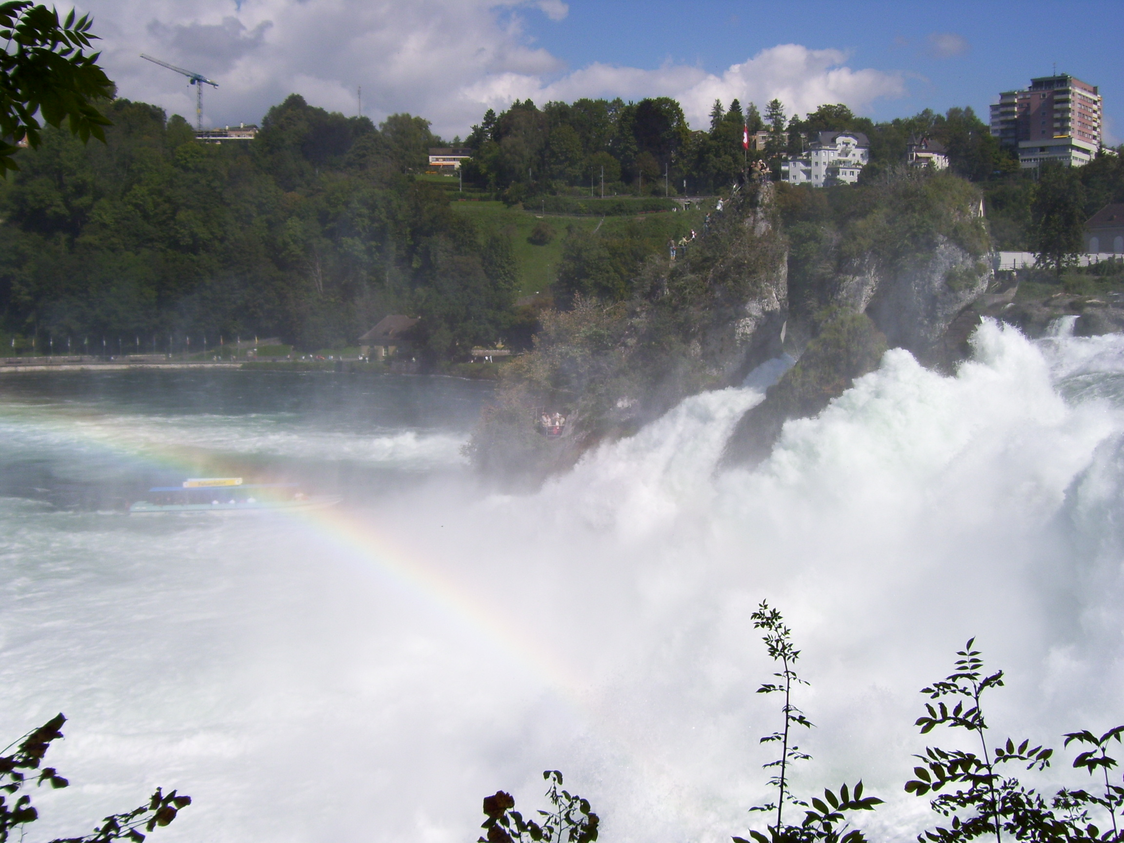 Der Rheinfall mit Regenbogen zwischen Laufen und Neuhausen in der Schweiz